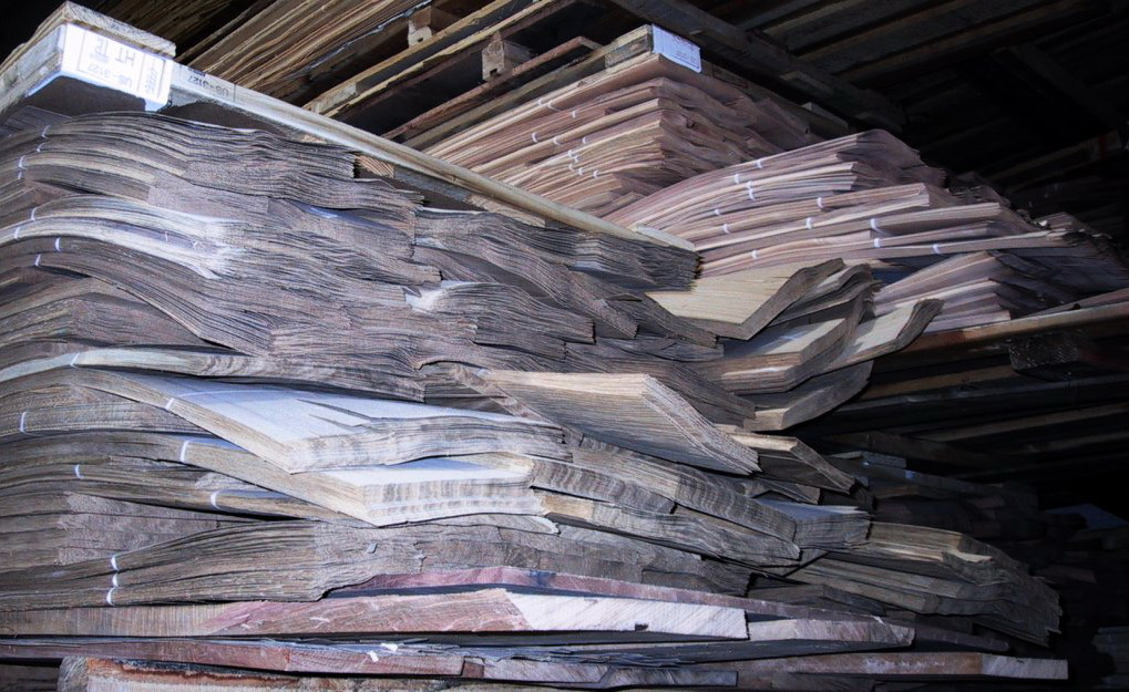 Furnierstapel vor der Verarbeitung.